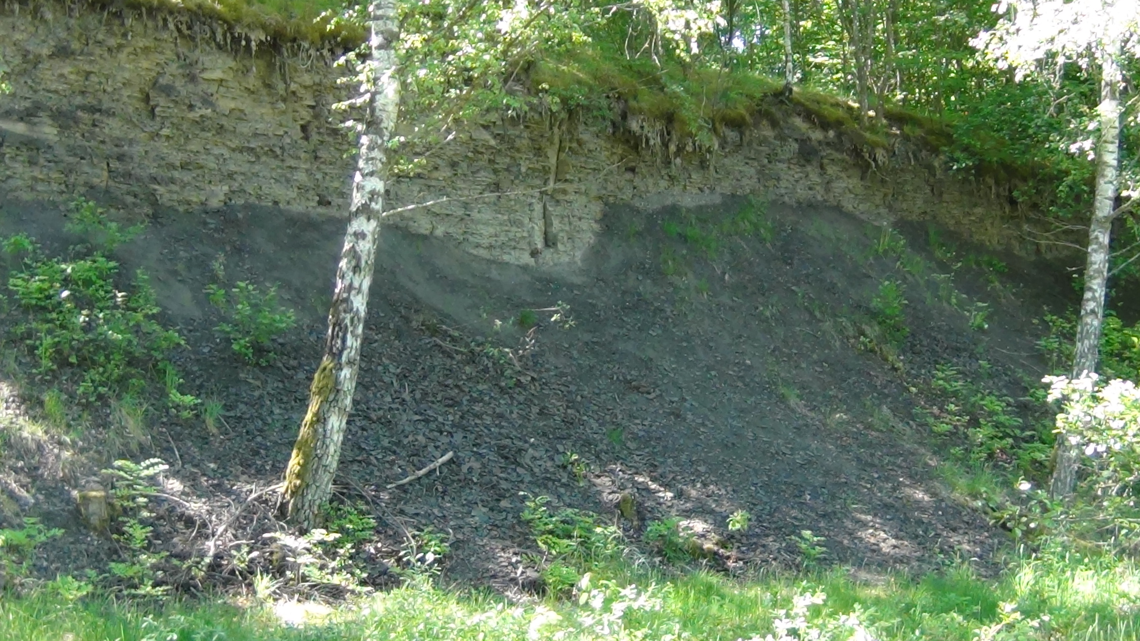 Nedlagt dagbrott för stenkol och lera i Borgens naturreservat utanför Vallåkra i Skåne län, Sverige.